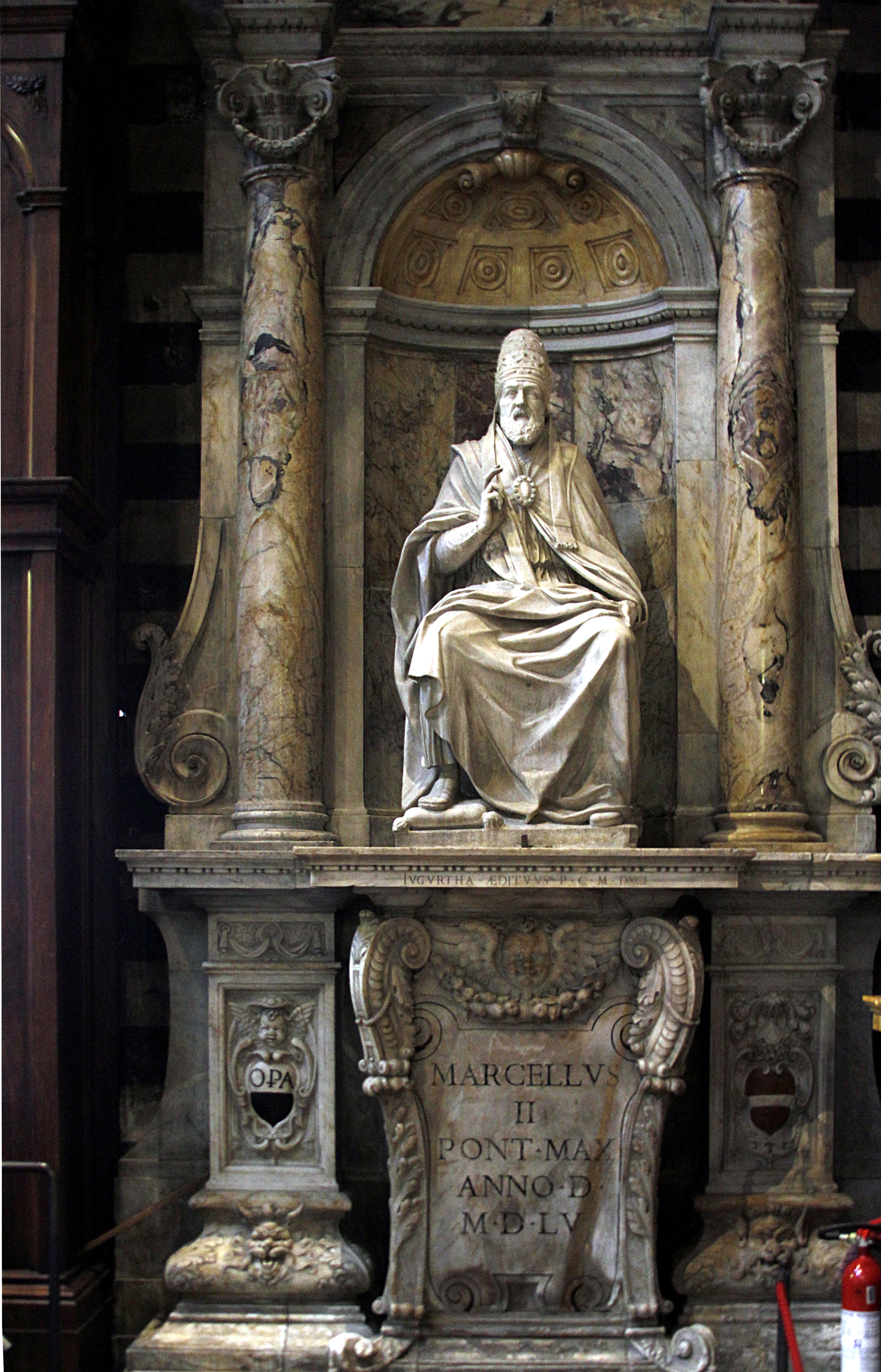 Duomo - Siena